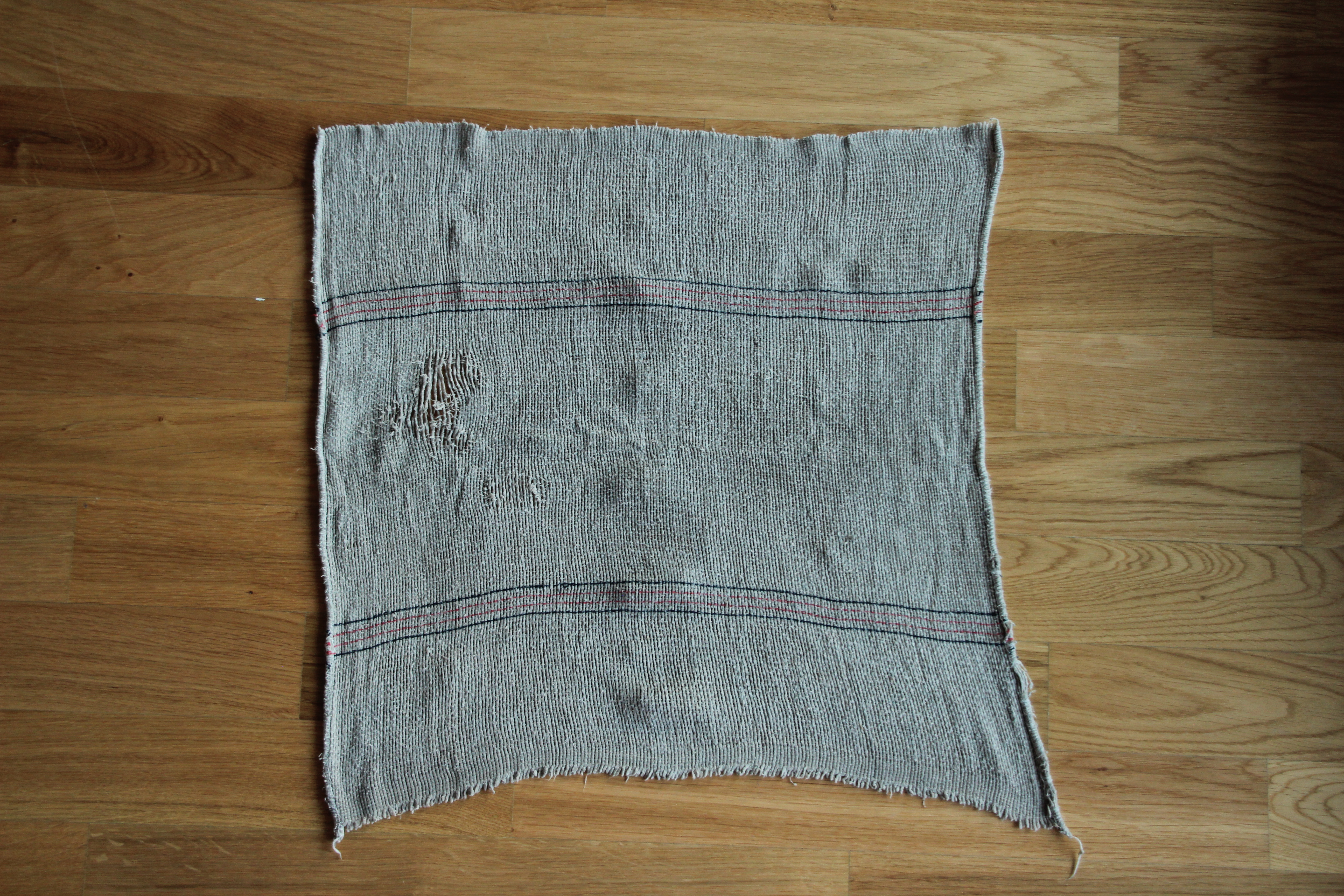 Bildinhalt: Gebrauchter, feuchter, grauer Putzlappen auf braunem Parkettboden Aufnahmeort: Frankfurt am Main, Deutschland